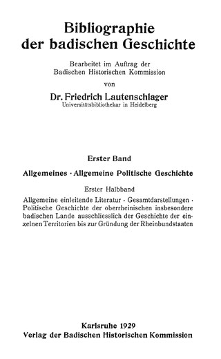 Bibliographie der badischen Geschichte Nutzungsbedingungen ausdrücklich auch für Wikipedia (siehe: [1]